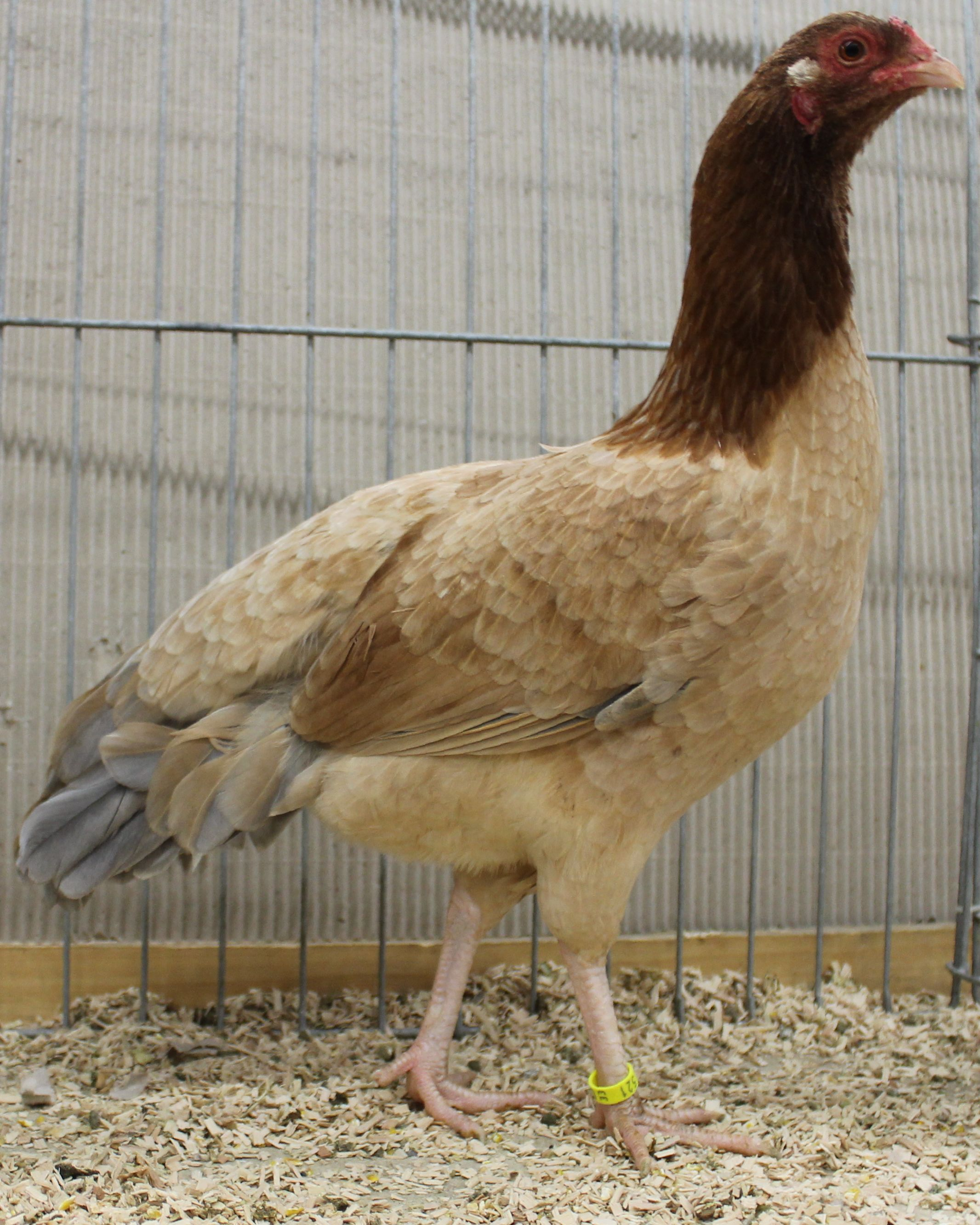 Cubalaya-Junghenne, blau-zimtfarbig auf der Sonderschau in Köln 2011.